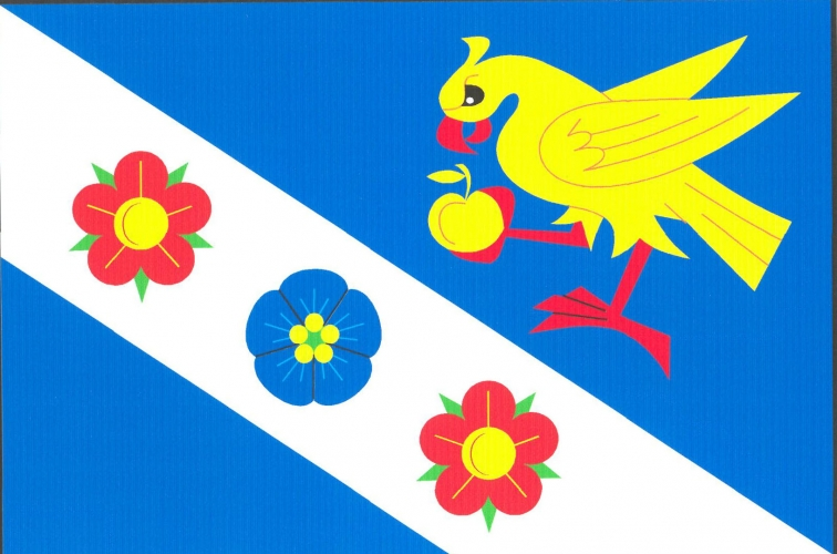 vlajka, Přehořov, okres Tábor